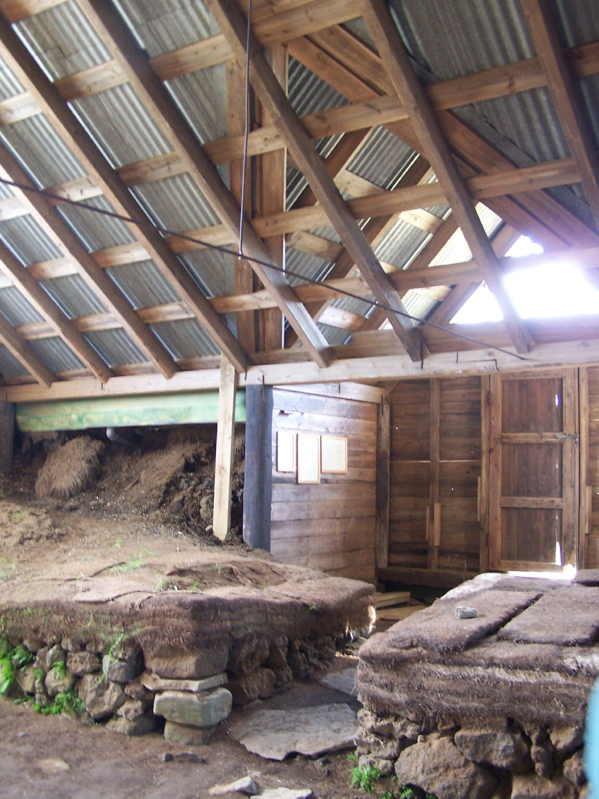 Stöng, interior detail